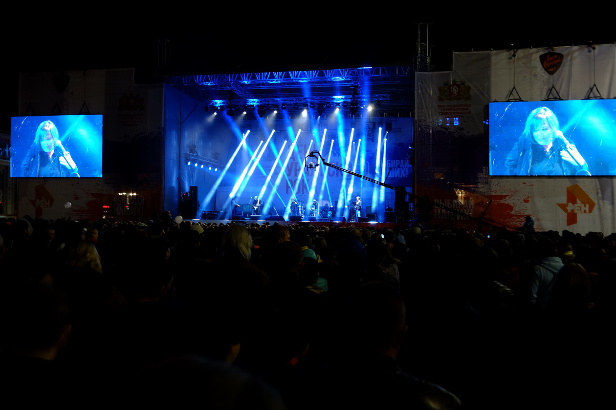 Концерт, посвящённый 30-летию Свердловского рок-клуба 10 сентября 2016 года на Площади 1905 года в Екатеринбурге. Выступление группы "Настя"